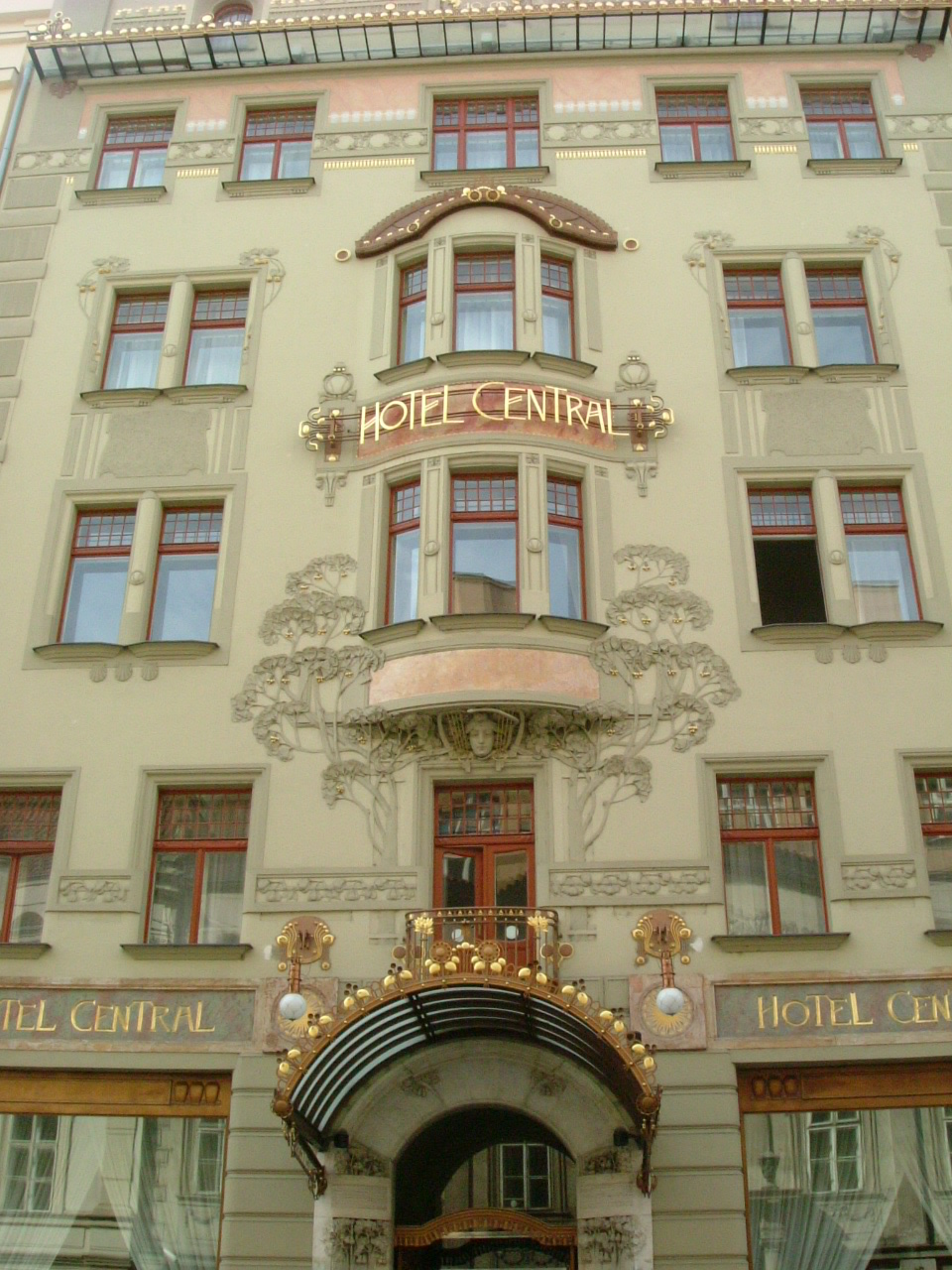 Jugendstilhotel "Central" in Prag, Friedrich Ohmann, 1899-1902